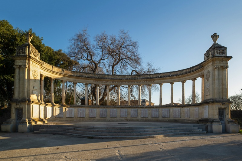 Monument aux morts - Archives départementales de l’Hérault - FRAD034-2637W-Montpellier-00001